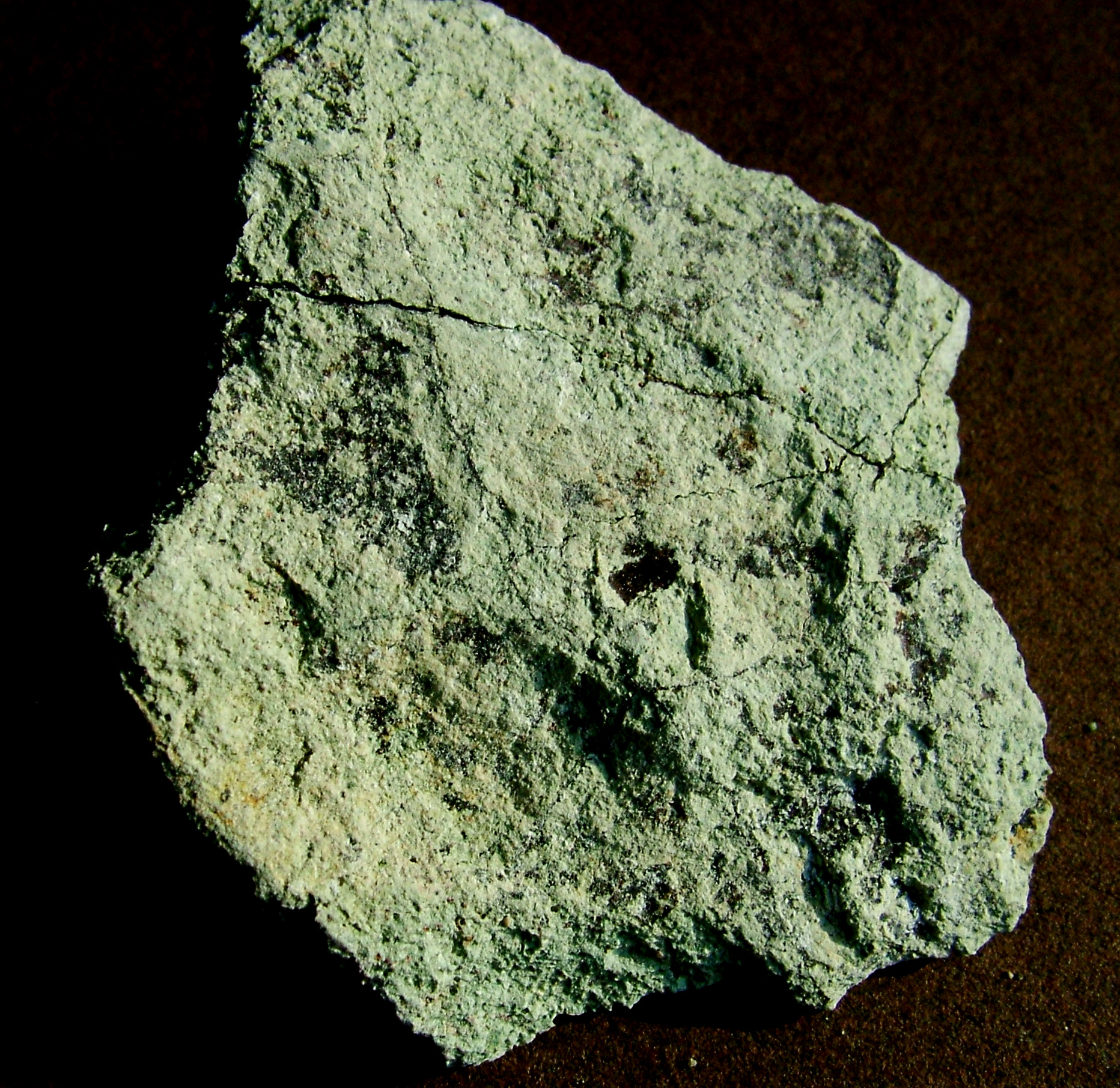 Kőzetminta a felsőörsi geológiai bemutatóhelyről